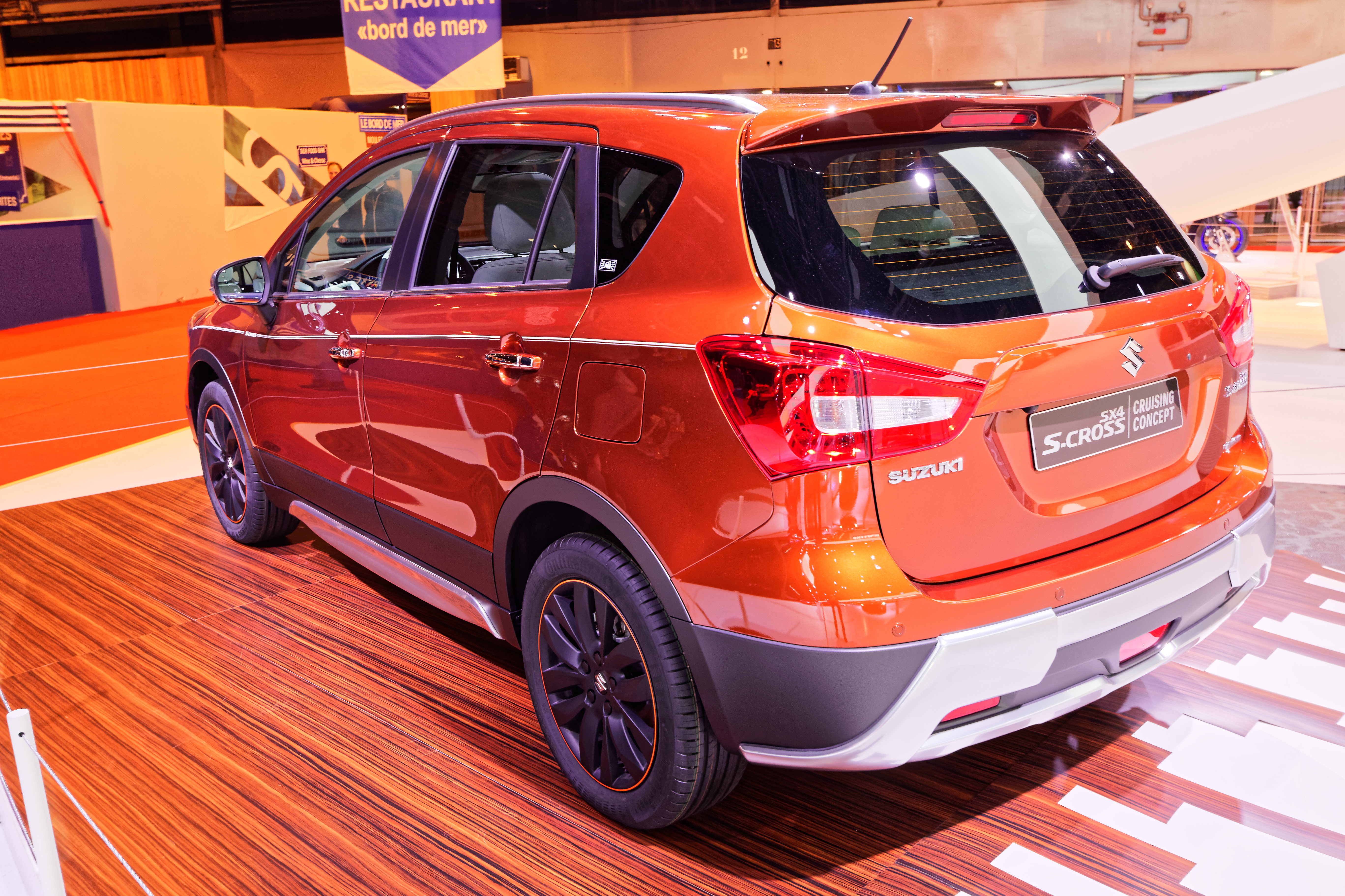 Une Suzuki S-Cross Cruising Concept présentée lors du mondial de l'automobile de Paris 2016.